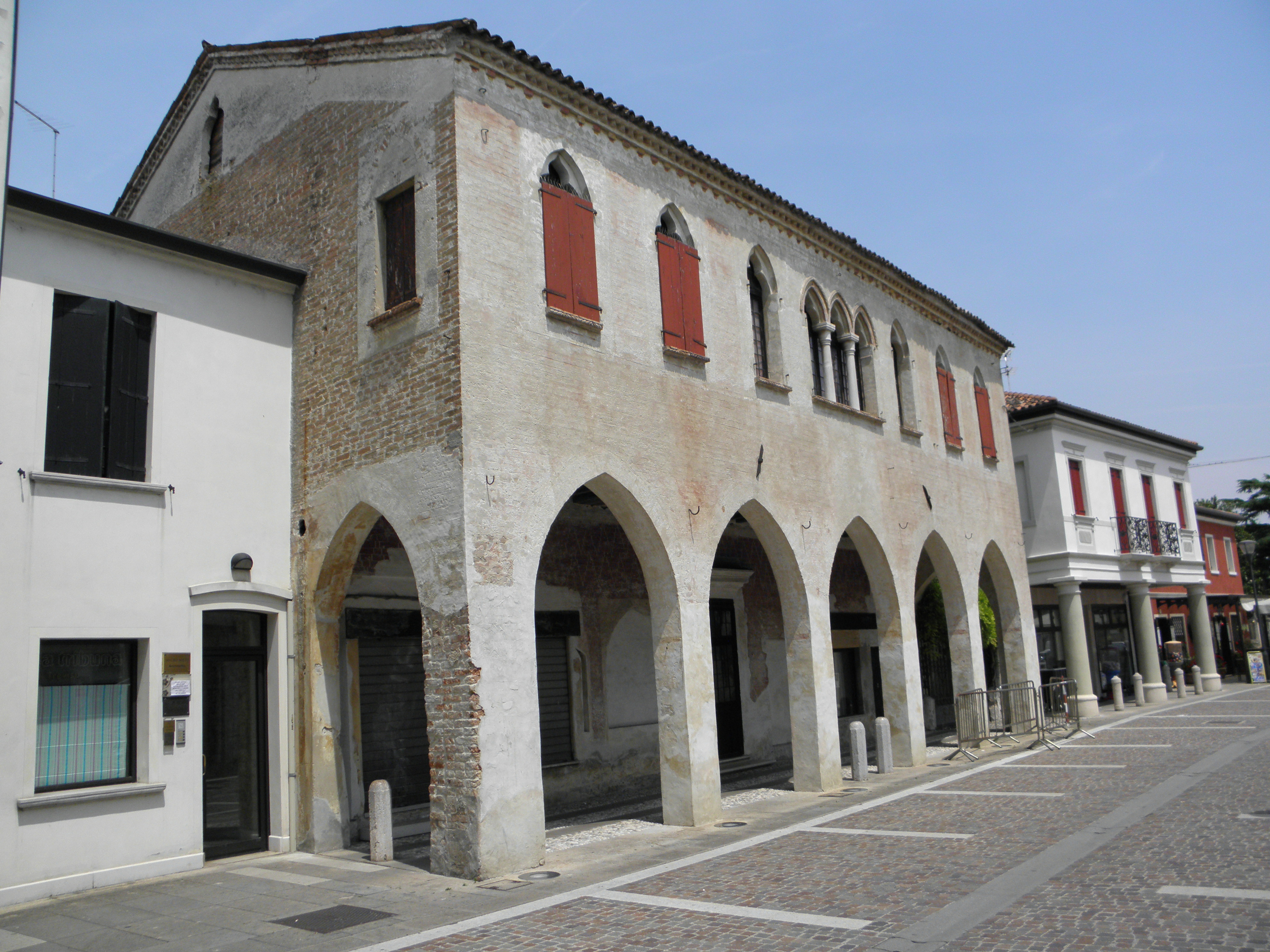 Zero Branco, Via Martiri della Libertà: la palazzina gotica.